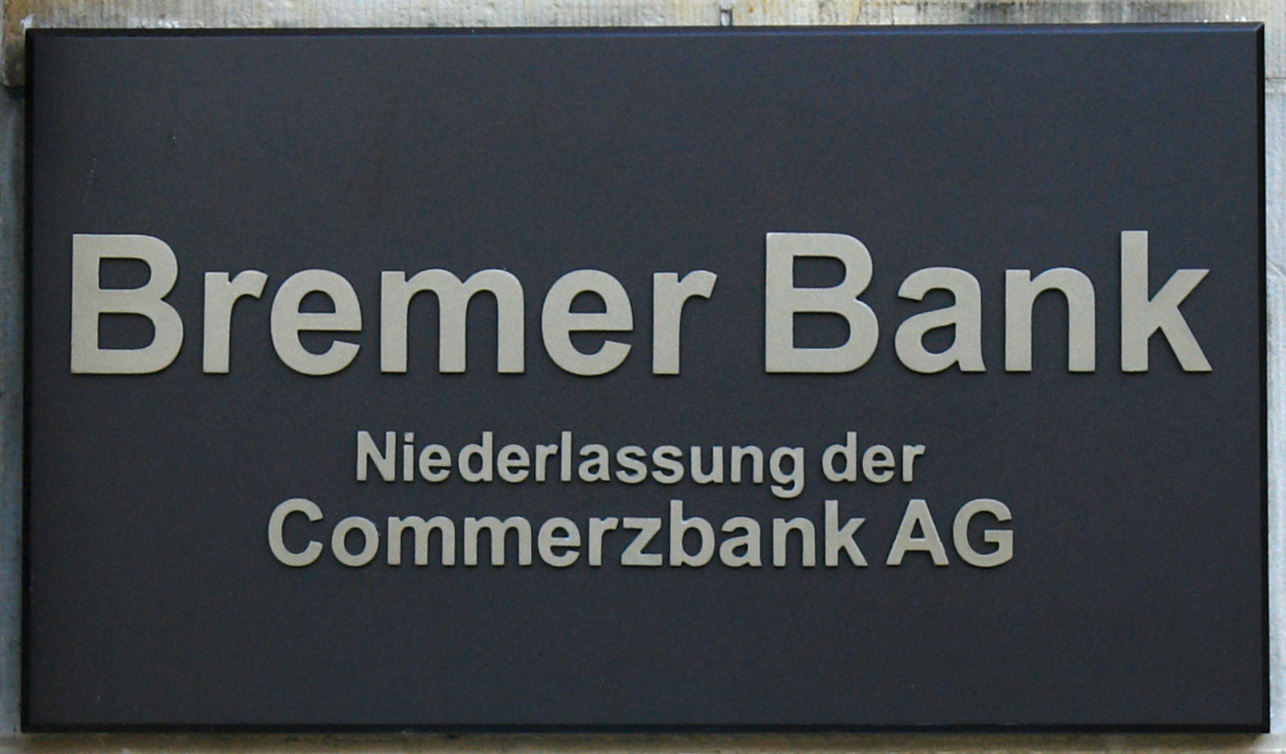 Bremer Bank (historischer Teil) Domshof 8. Neues Firmenschild